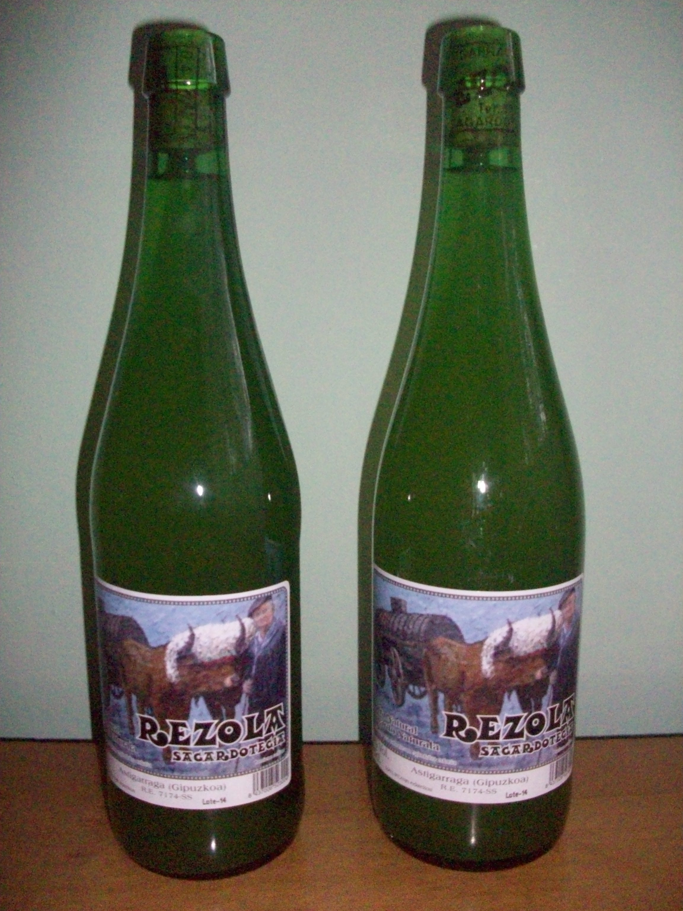 Astigarraga udalerriko sagardoa. Gipuzkoa, Euskal Herria. / Cider from Astigarraga village. Guipuscoa, Basque Country.